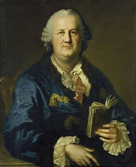 Johann Daniel von Olenschlager (1711-1778), 1647 geadelt, Jurist, Frankfurter Patrizier